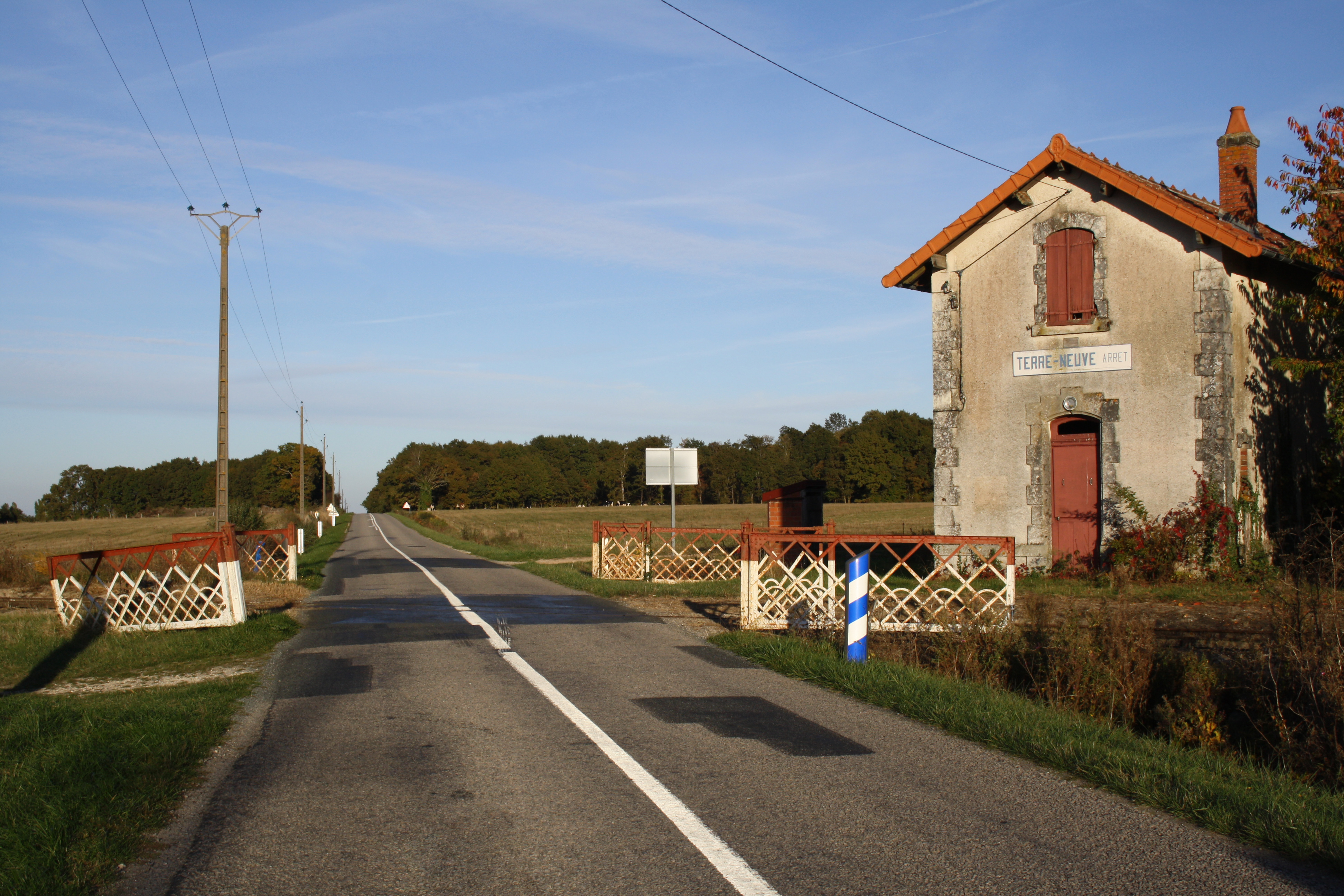 Haltepunkt Terre-Neuve des Chemin de Fer du Blanc-Argent